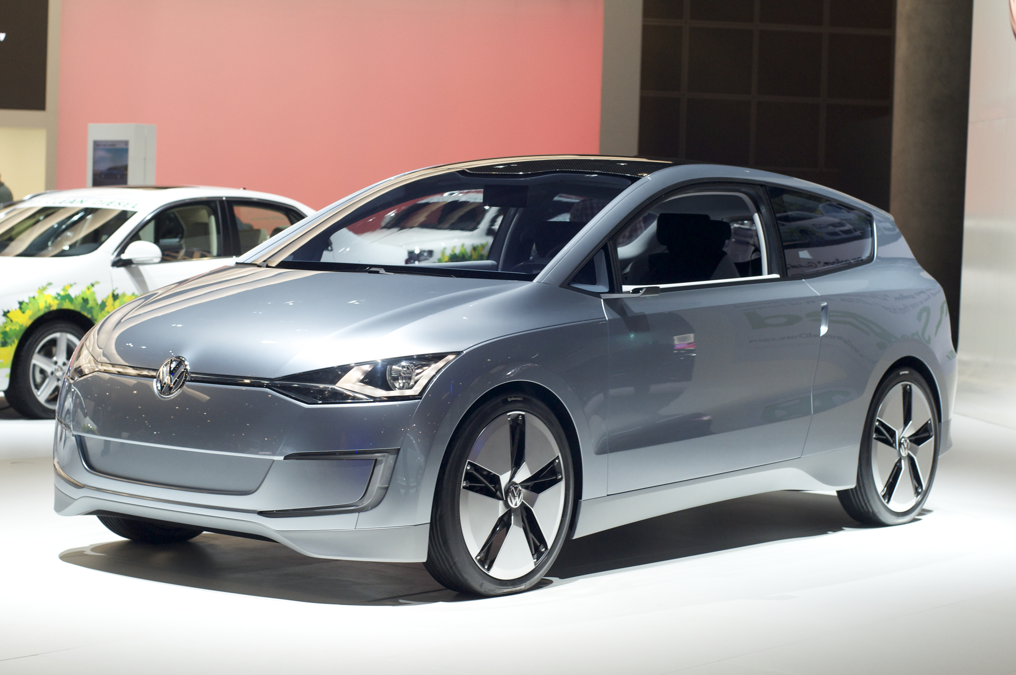 Volkswagen Up Lite at LA Auto Show 2009.